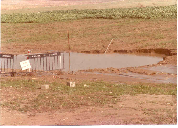 הבור שנפער במושב - דצמבר 1979.